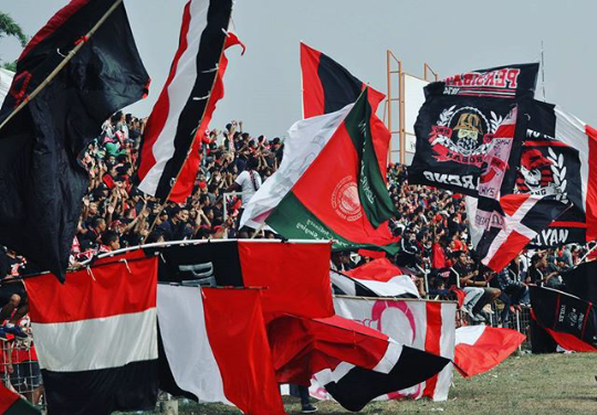 Suporter Persibat Batang